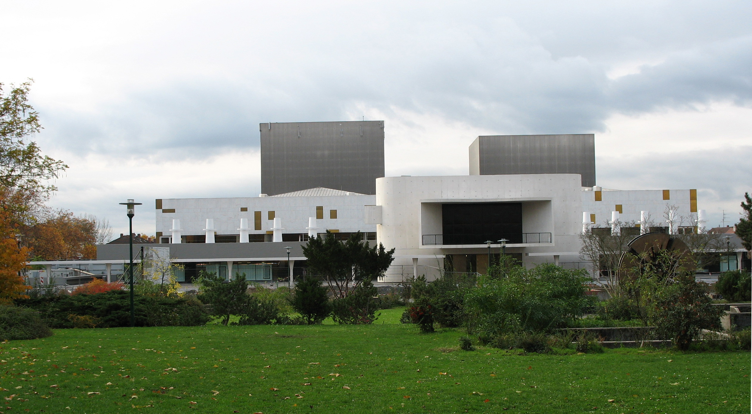 Außenansicht des Staatstheaters Darmstadt, Ostseite